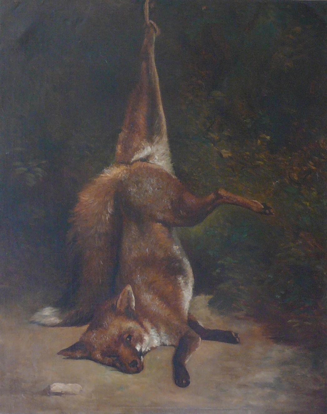 Le Renard